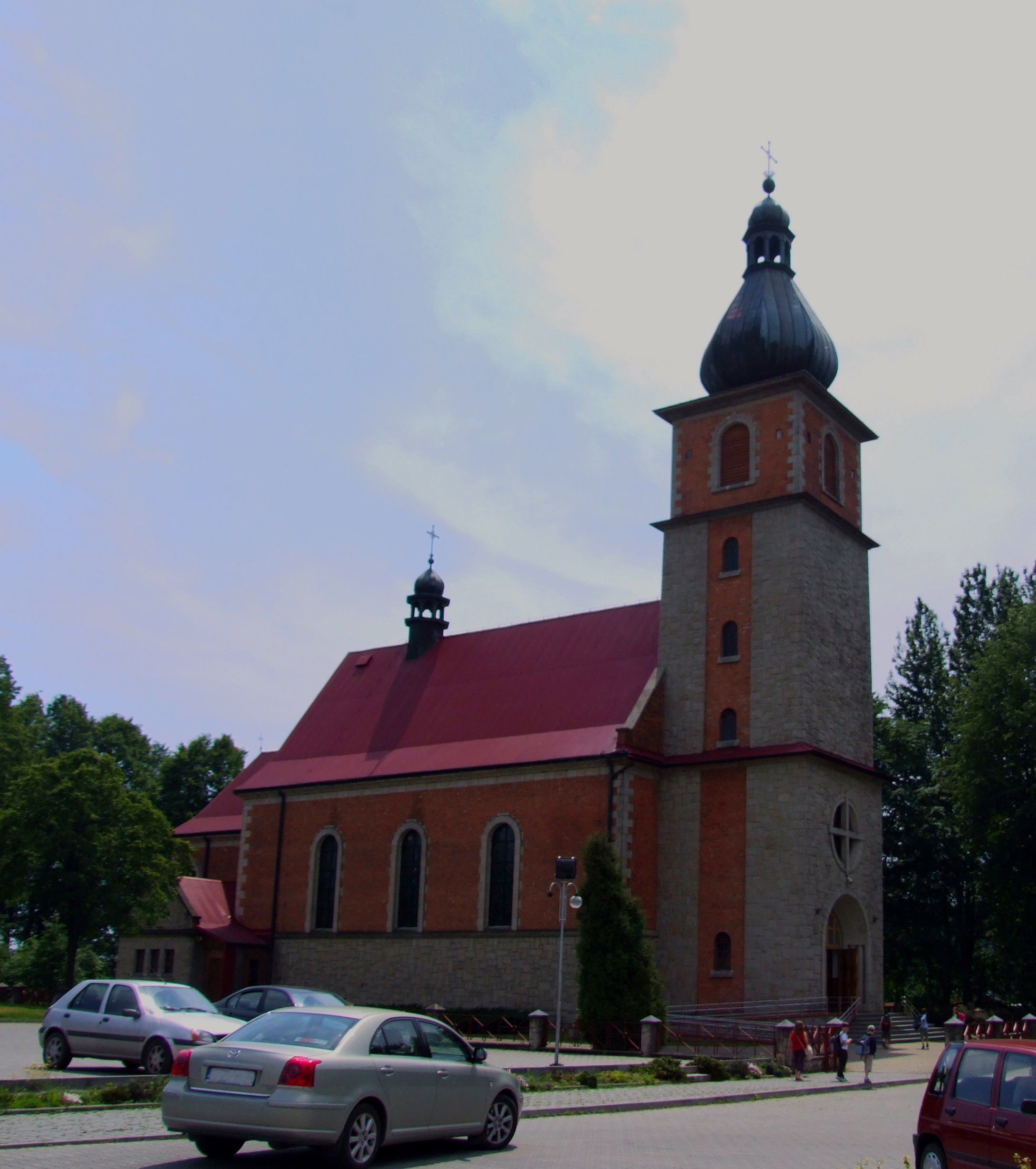 Iwkowa - kościół Podwyższenia Krzyża Świętego